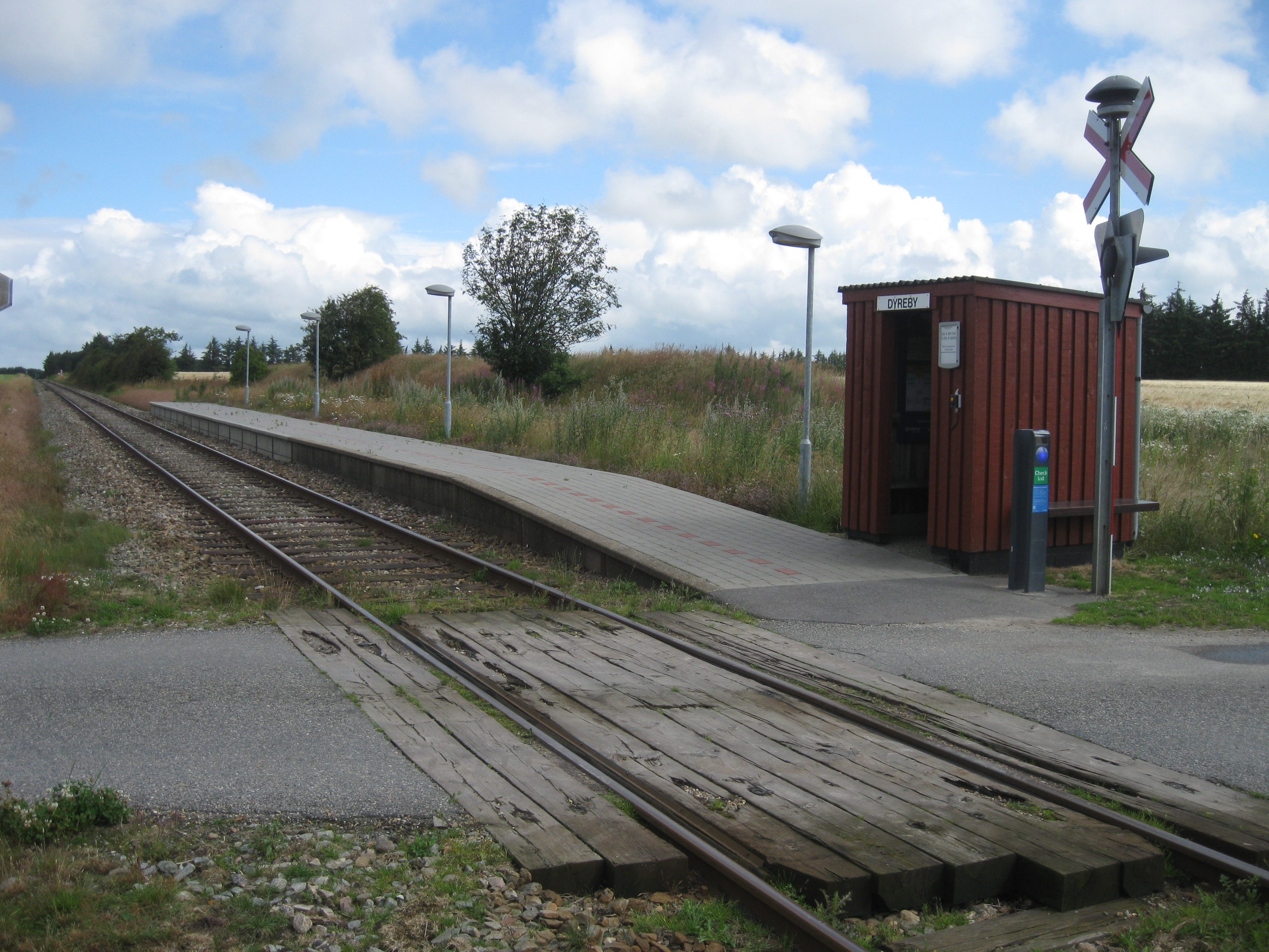 Dyreby Station